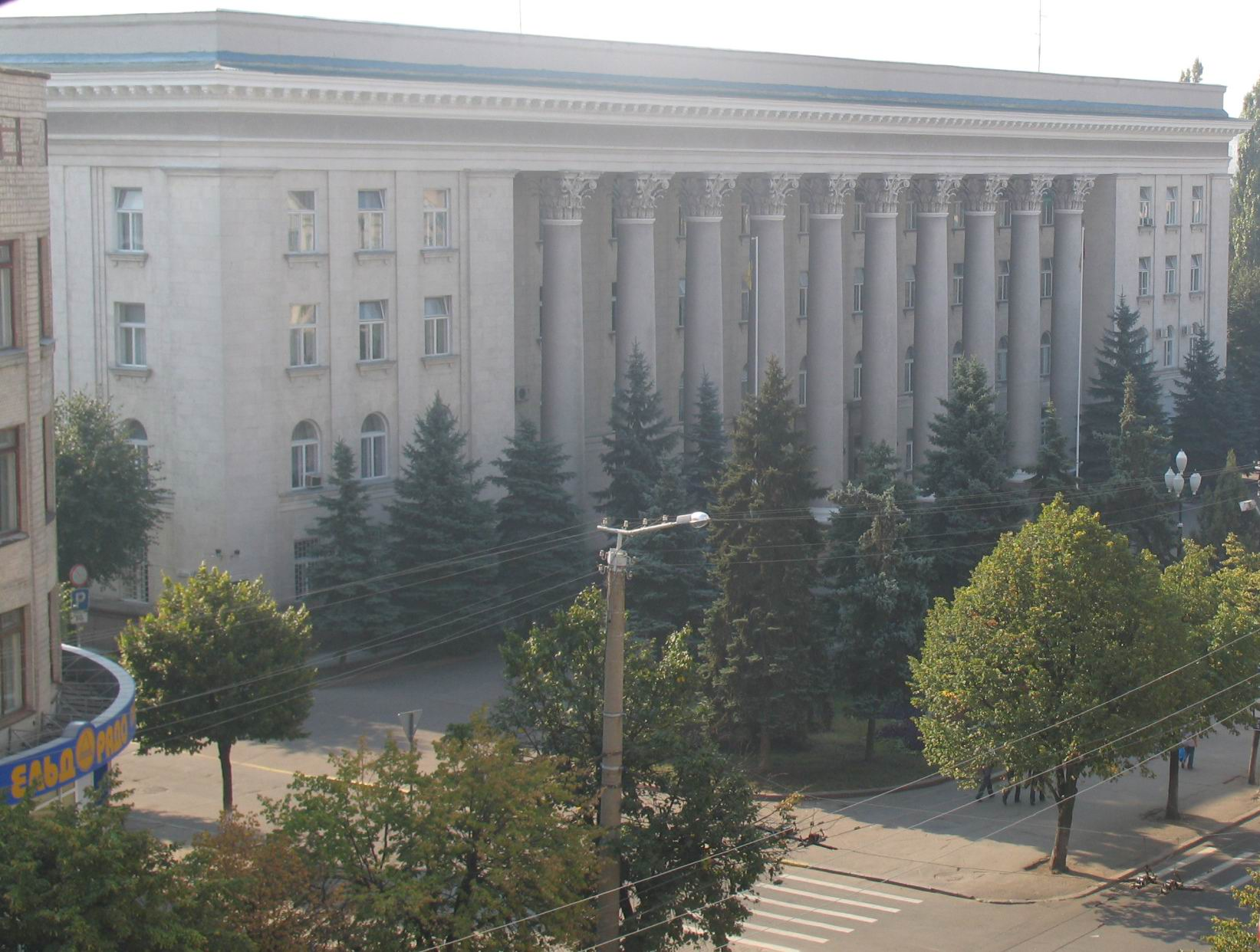 Kirovohrad skyline